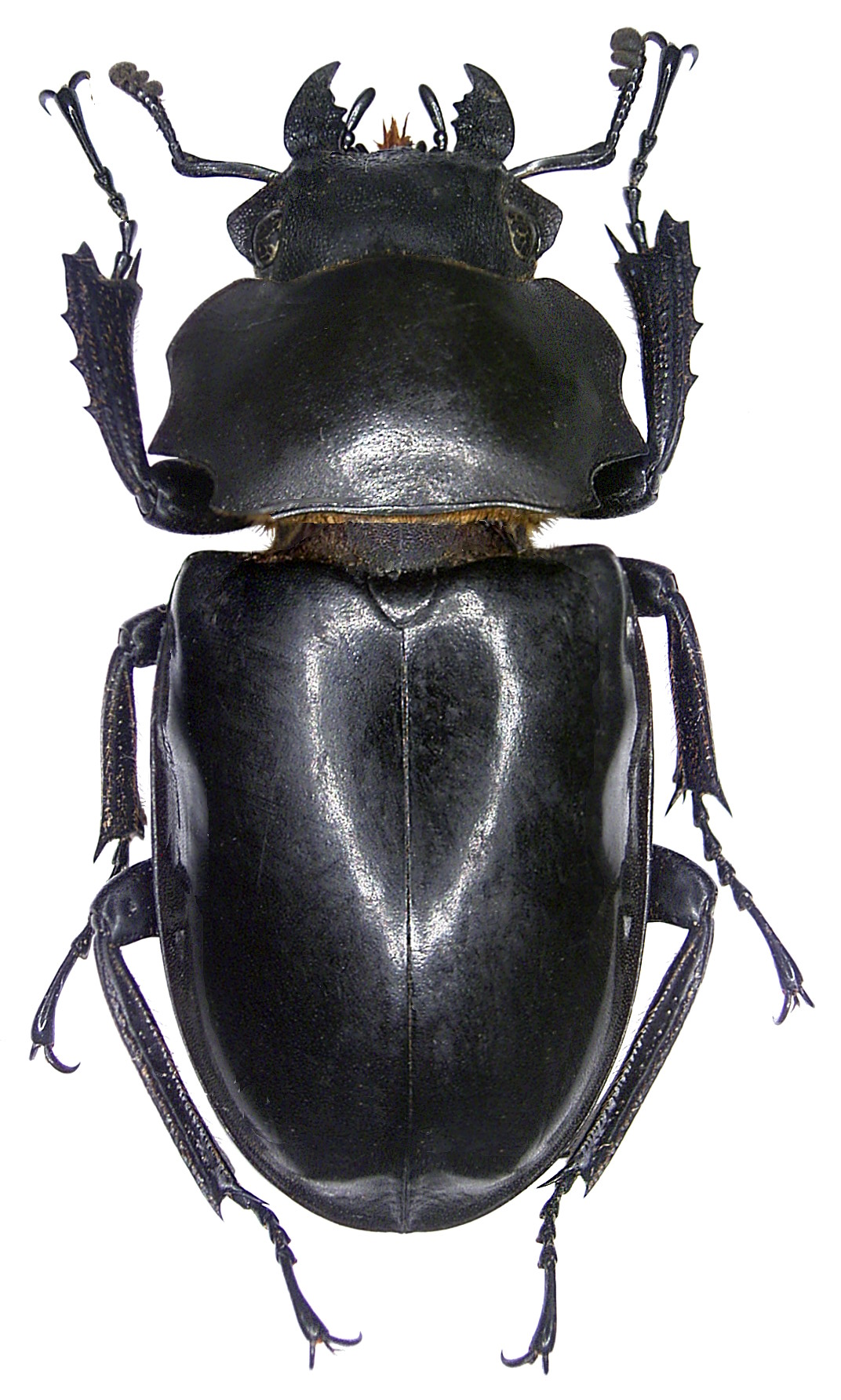 Familie: Lucanidae Grösse: 34-42 mm Fundort: Indonesien, Sulawesi, Toraut leg. A.Skale, 2006; det. U.Schmidt, 2007 Foto: U.Schmidt, 2007